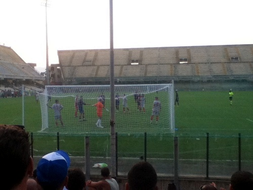 Salerno-Internapoli: scena di gioco della partita di Coppa Italia Serie D 2011-2012